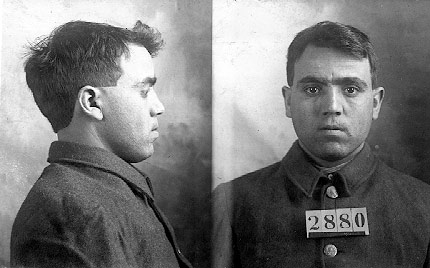 Vincenzo Giglio, 1910.